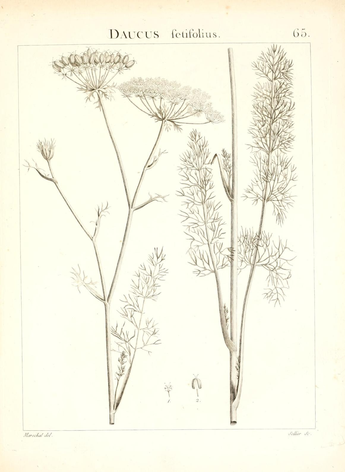 DAUCUS icdfolius 65, AfarecAa/ ./,-/. Ll^e/ier i.lc .